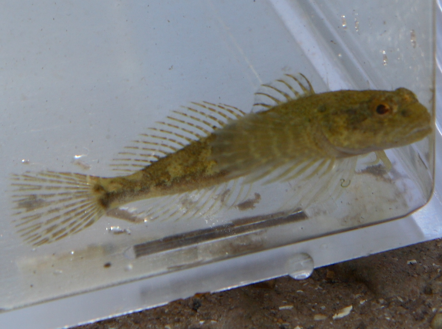 Chabot du Lez photographié le jeudi 8 mars en sortie avec les élèves de CM2 de l'école primaire de Prades le Lez.